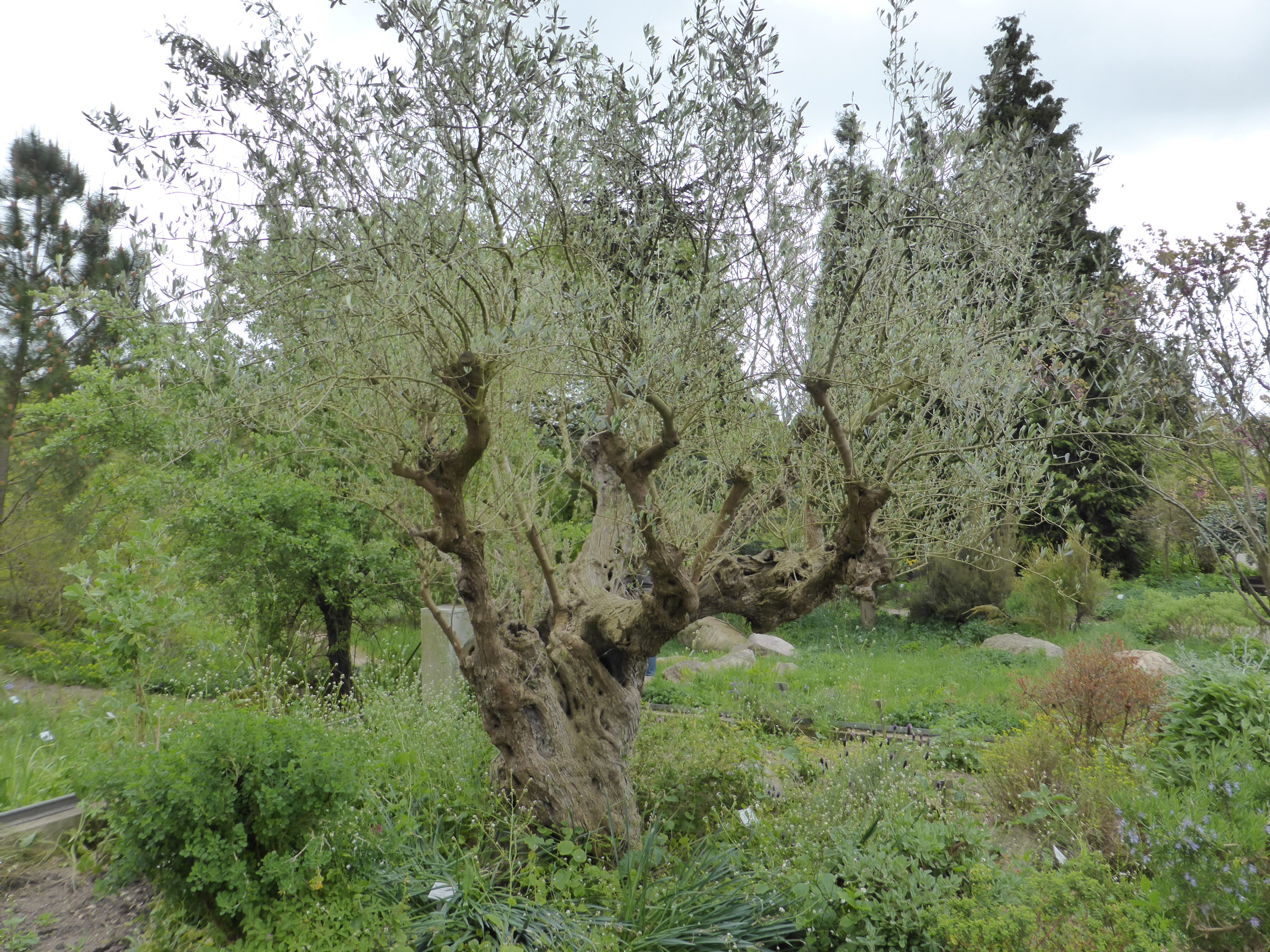 Loki Schmidt Garten Hamburg, 100jähriger Ölbaum im Bibelgarten